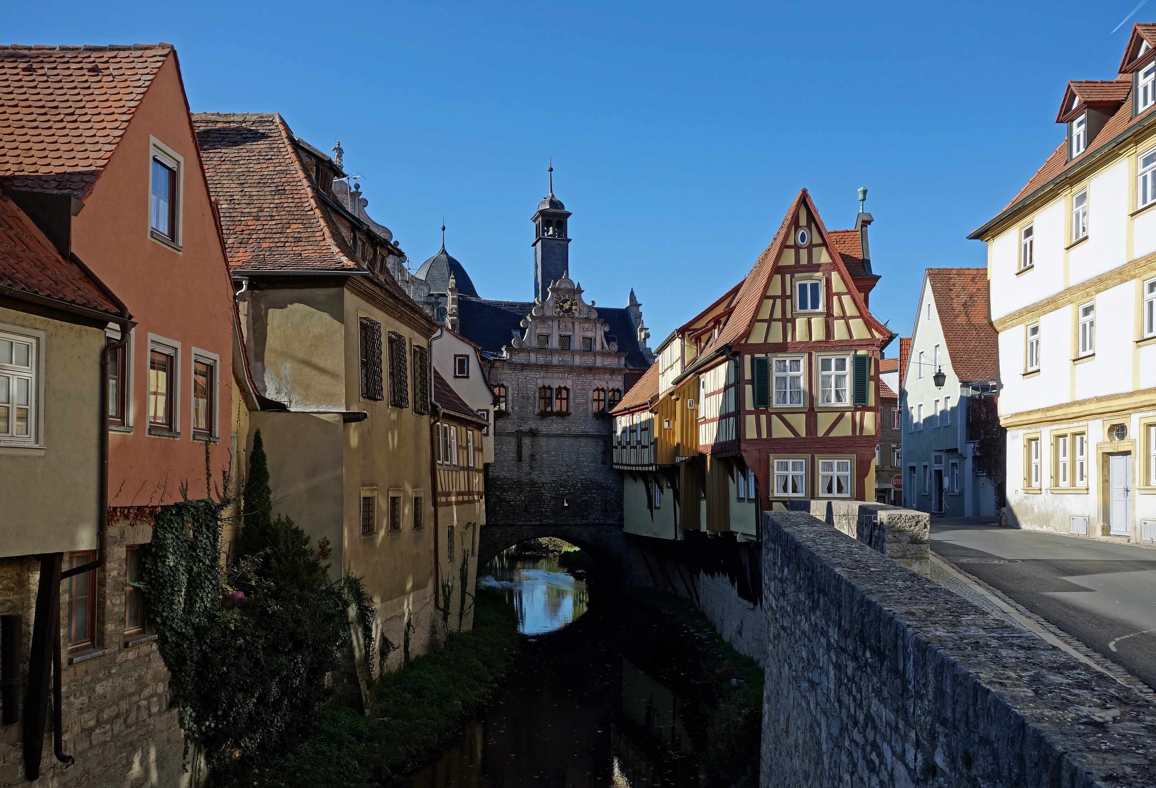 Malerwinkel in Marktbreit